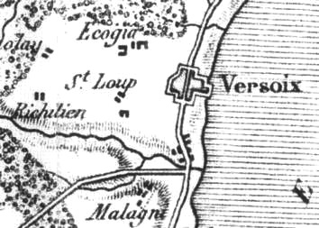 Extrait de la carte Duvotenay de 1837, Versoix et environs immédiats, dont Ecogia.